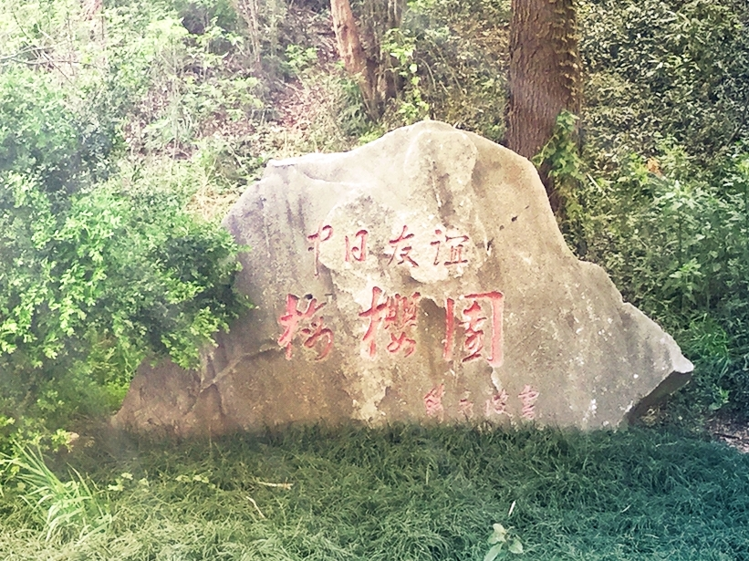 宝塔山公园的中日友谊梅樱园